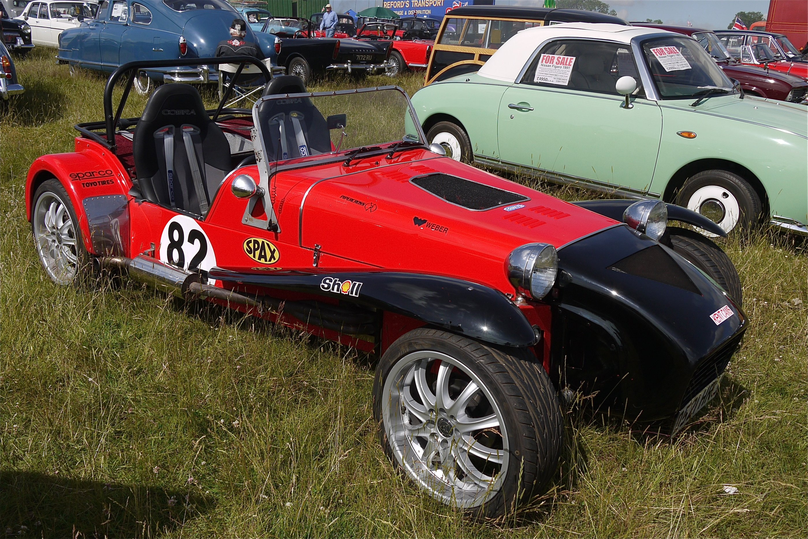 Panasonic G1 14-45 Lens